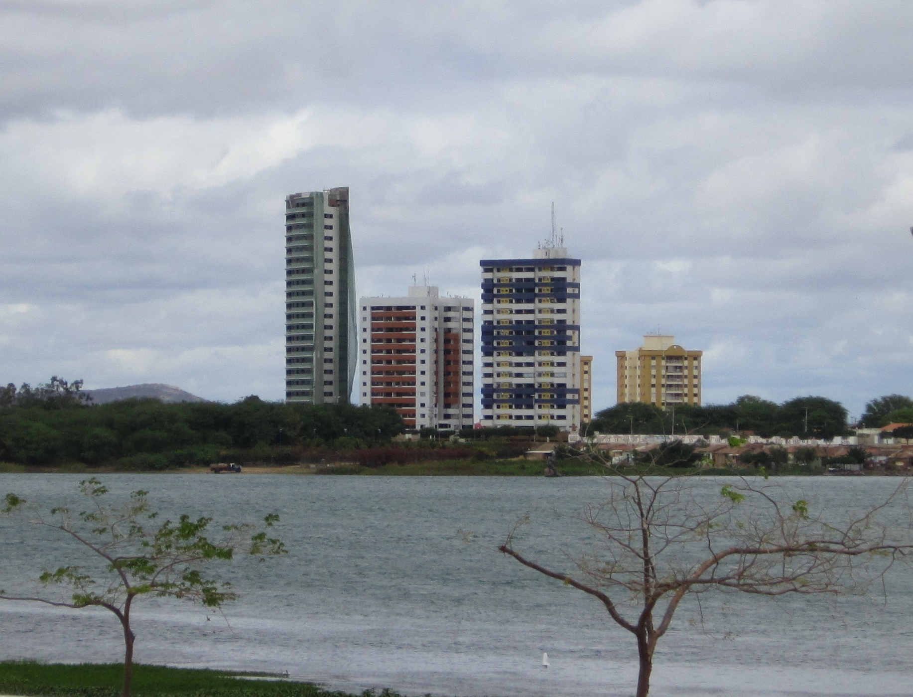 Orla I - Juazeiro, Bahia